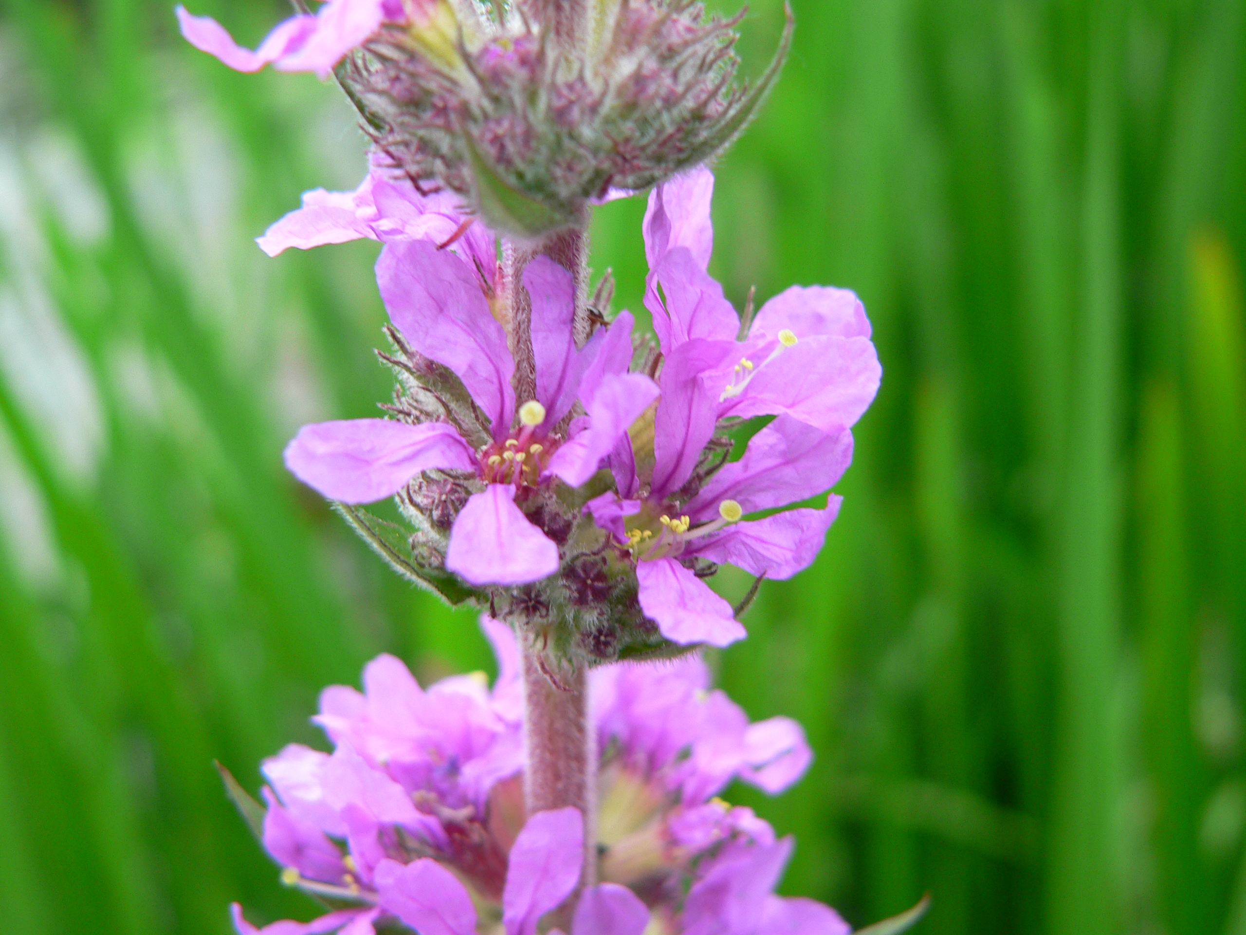 Blutweiderich